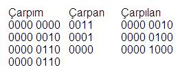 Kişiseldir